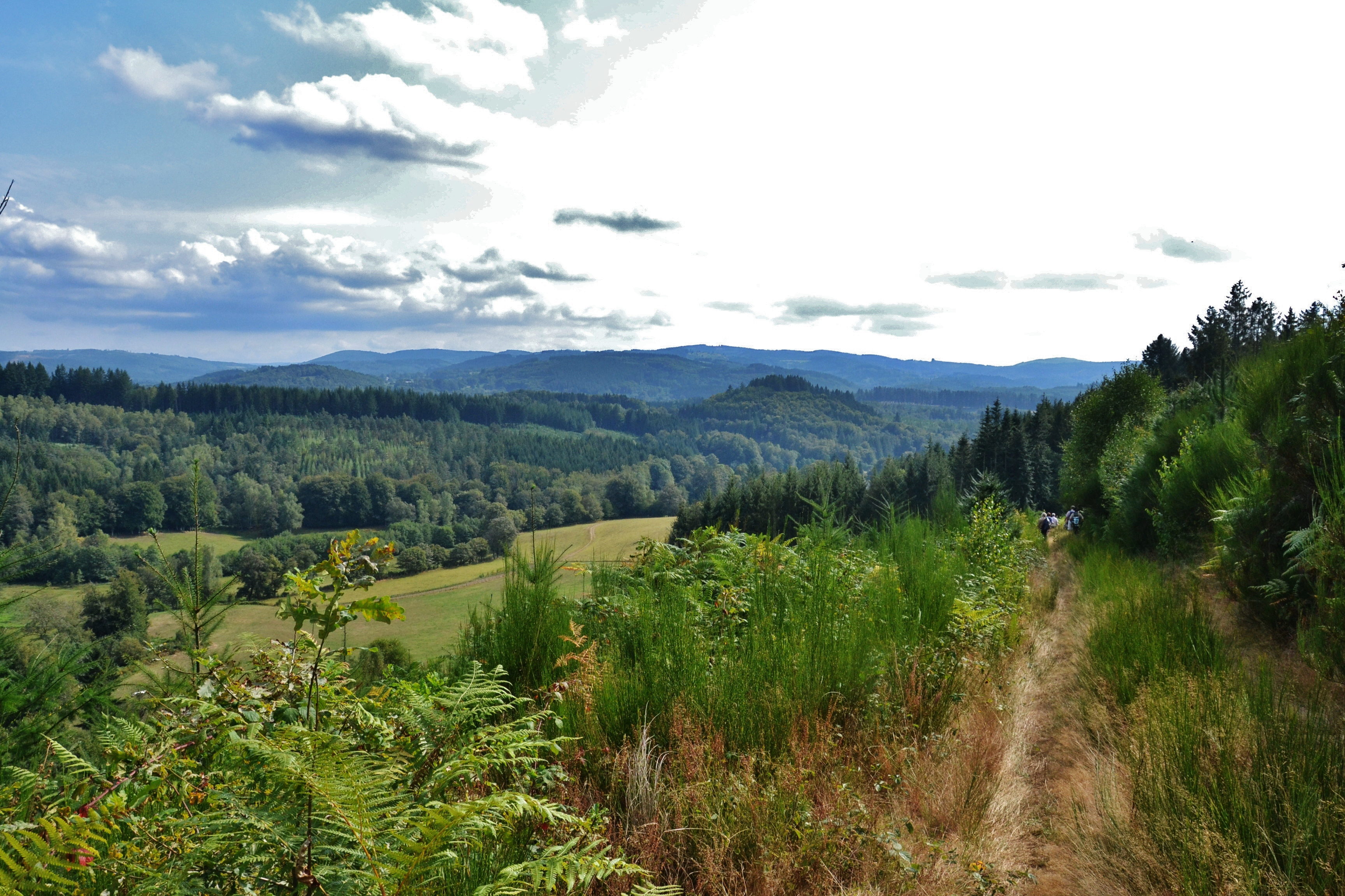 Paysage de la haute vallée de la Vienne, entre Nedde, Rempnat (Haute-Vienne) et La Villedieu (Creuse).